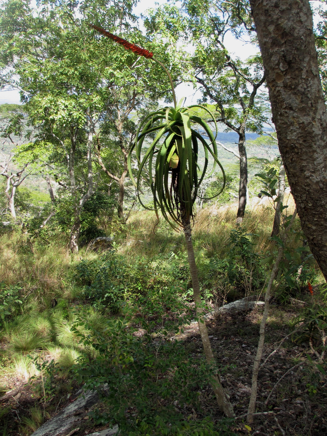 Aloe mawii - single stemmed